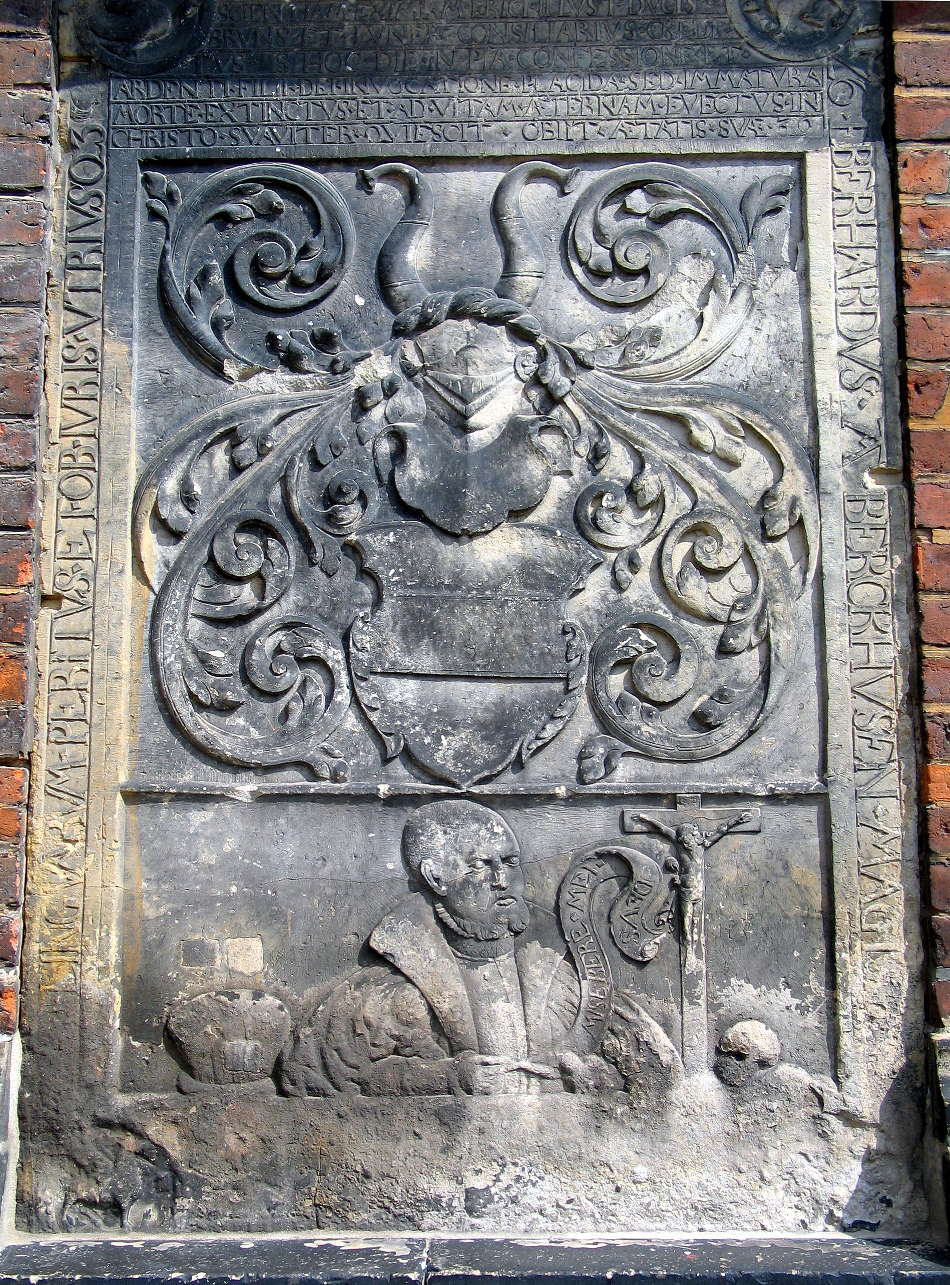 Grabplatte des Eberhard von Berckhusen (um 1525-1564) an der südlichen Aussenwand der Marktkirche in Hannover, zur Entzifferung und Übersetzung siehe Sabine Wehking: DI 36, Nr. 118 in Die Deutschen Inschriften des Mittelalters und der Frühen Neuzeit (DI) ...